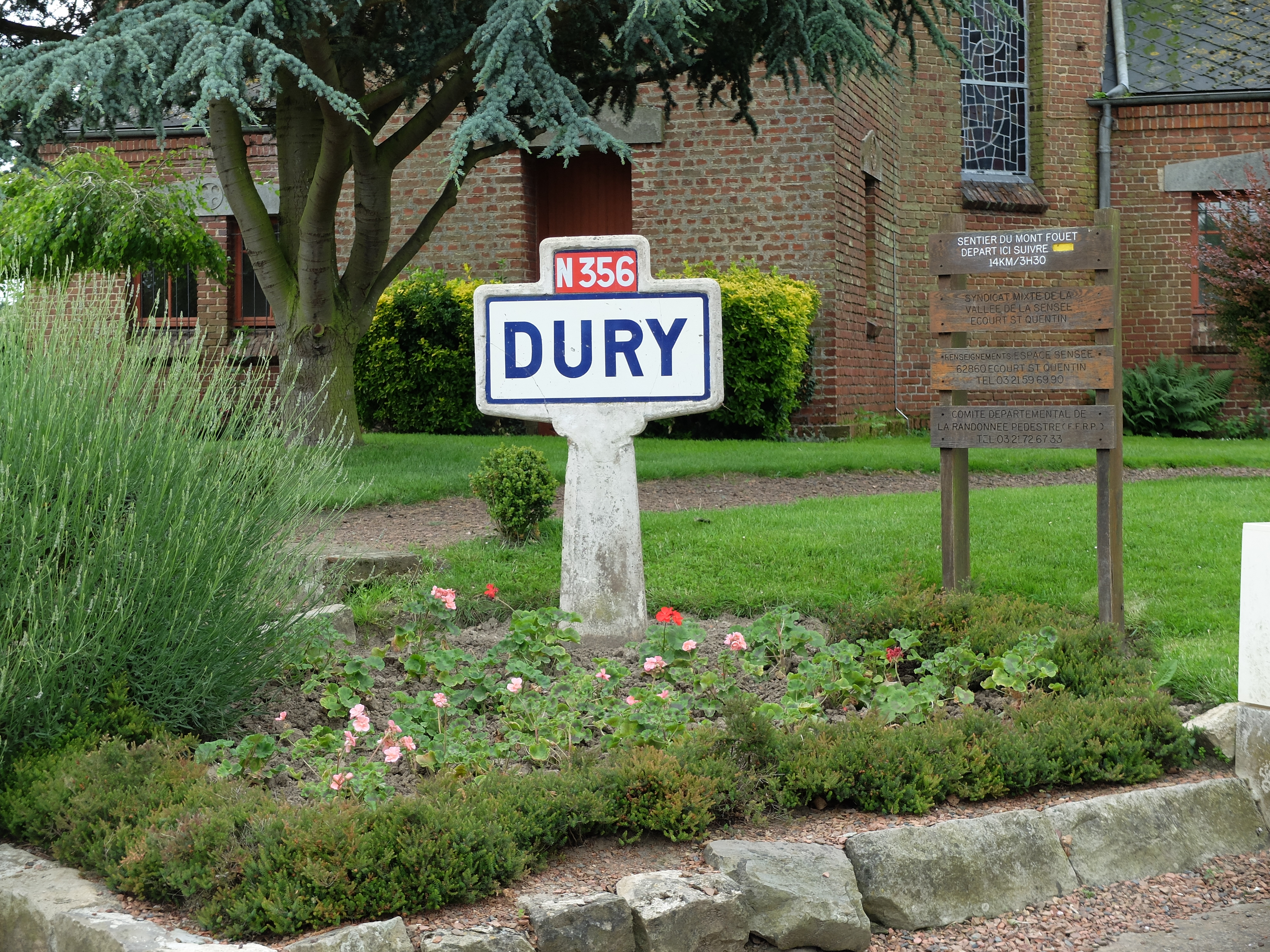 Vue d'un ancien panneau d'entrée de Dury (Pas-de-Calais), situé près de l'église.